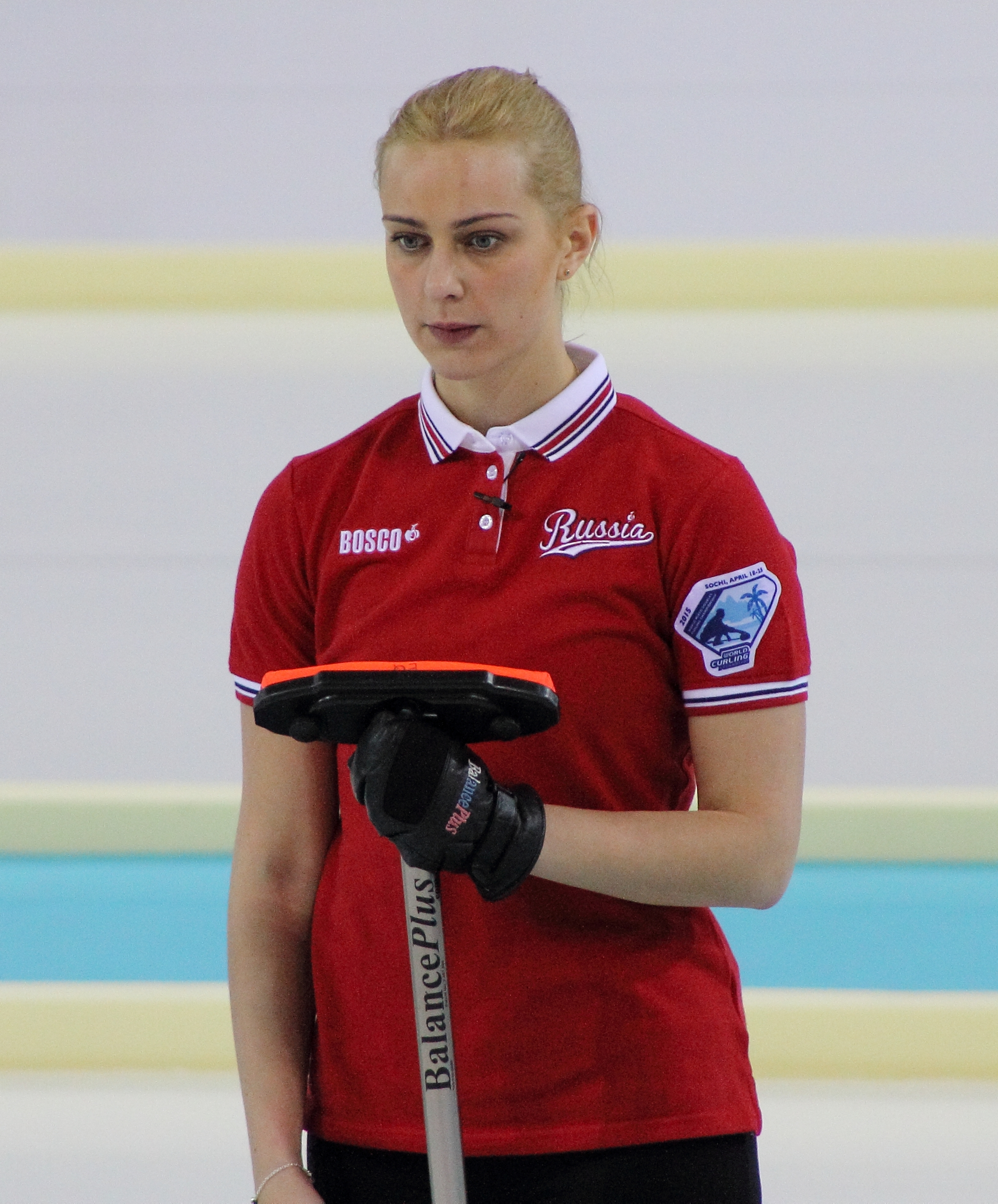 Участница чемпионата мира по кёрлингу среди смешанных пар Виктория Моисеева. Апрель 2015, Сочи